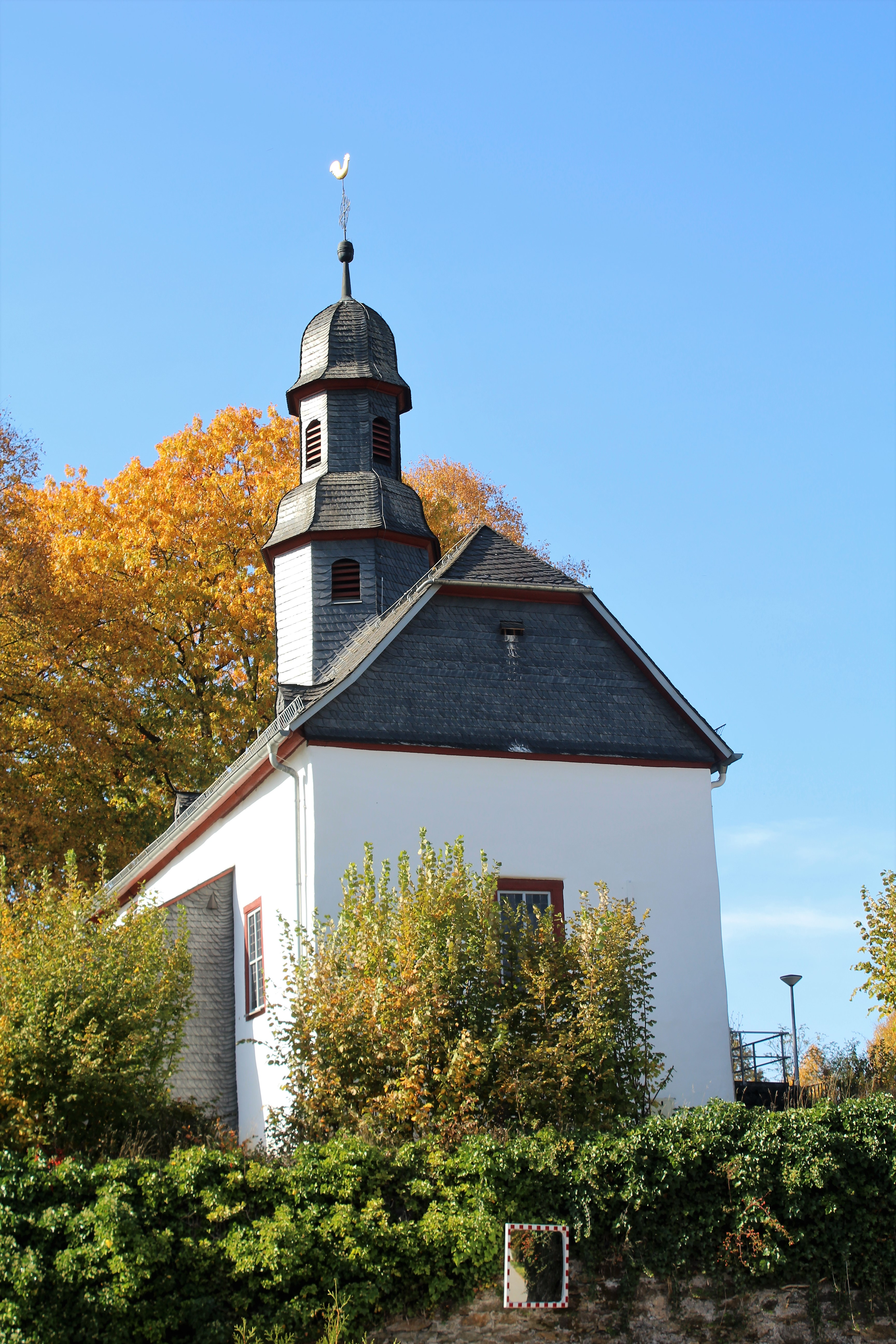 Evangelische Kirche Blasbach, Wetzlar, Lahn-Dill-Kreis, Hessen, Deutschland